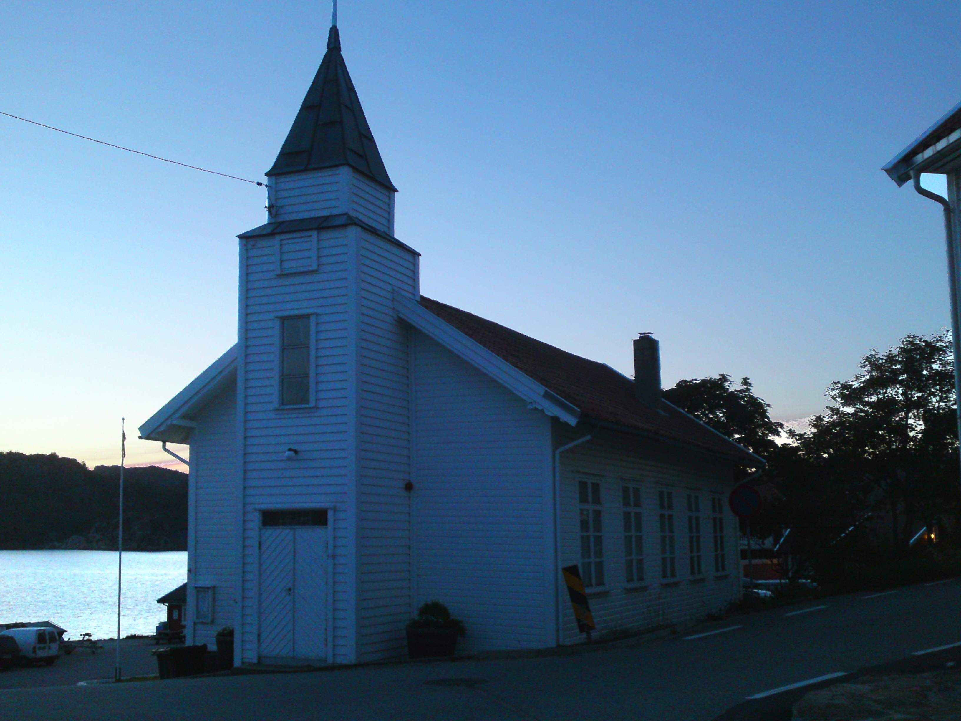 Korshamn kapell i Lyngdal